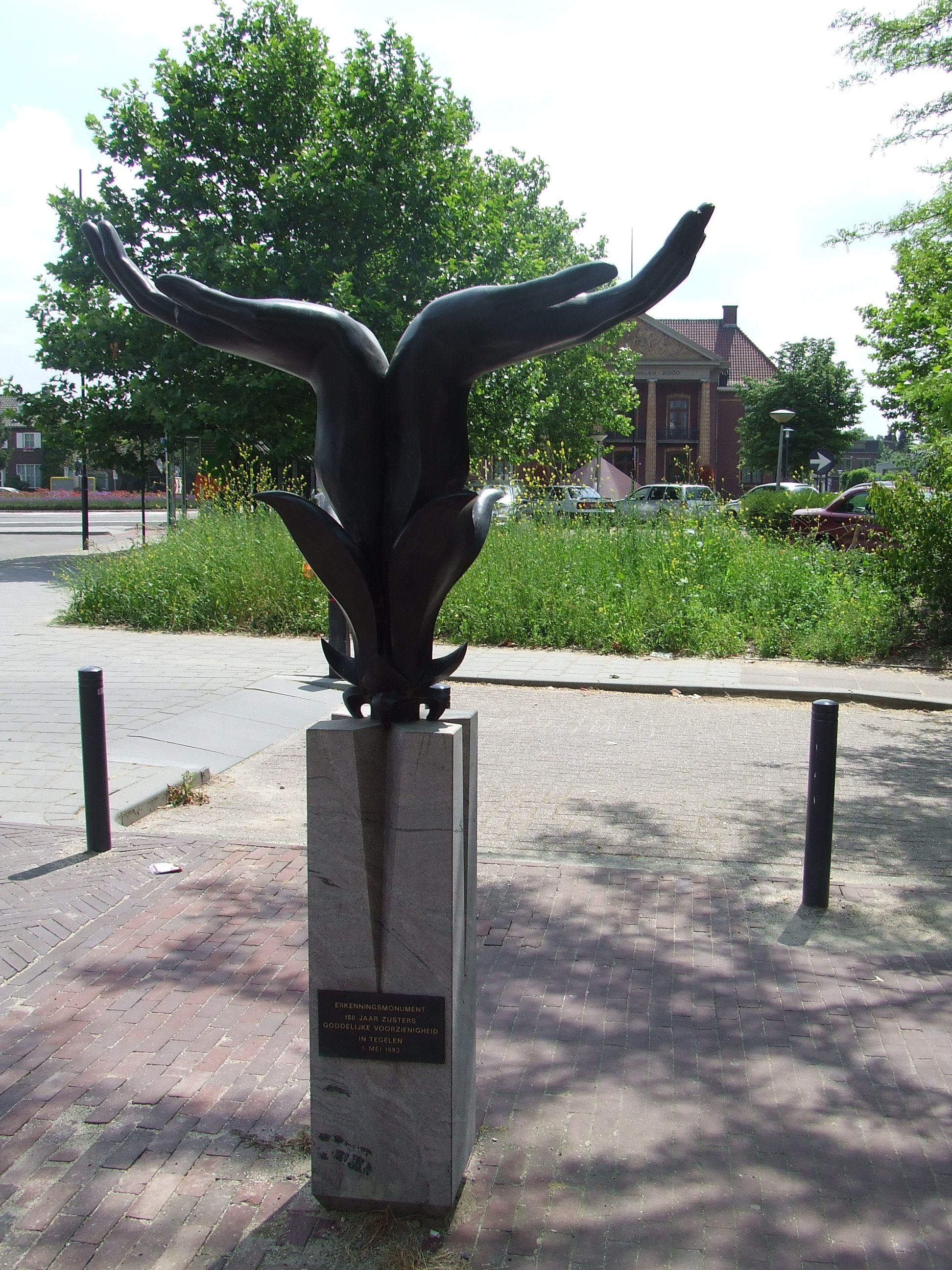 Sculptuur "Ontvangende en gevende handen" van Jos Oehlen, Tegelen 1993.